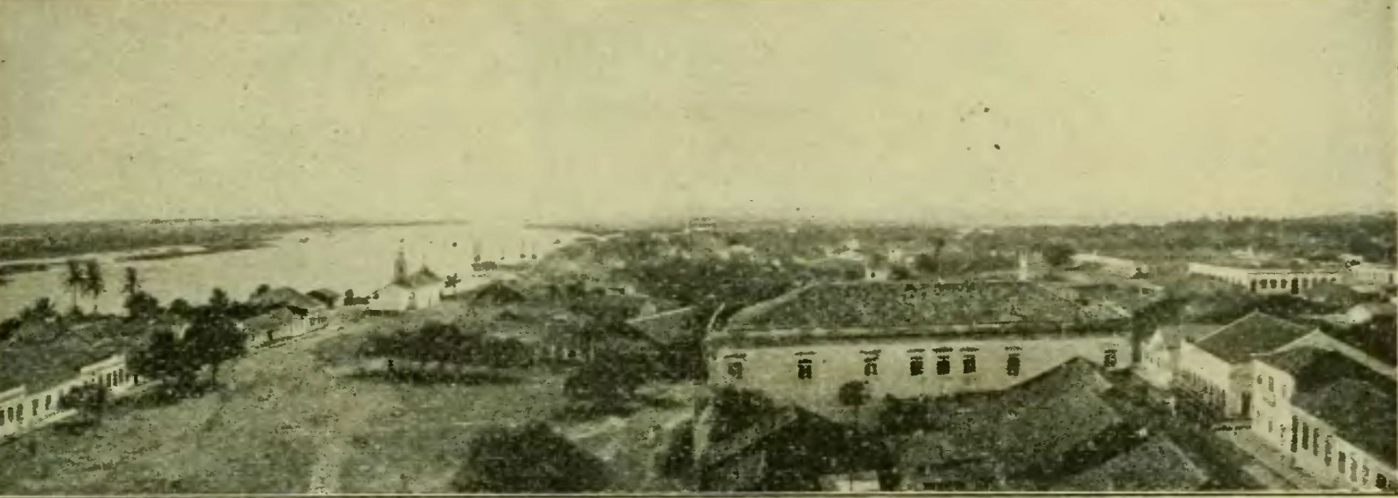 Imagem de Natal, Capital do Rio Grande do Norte em 1903.